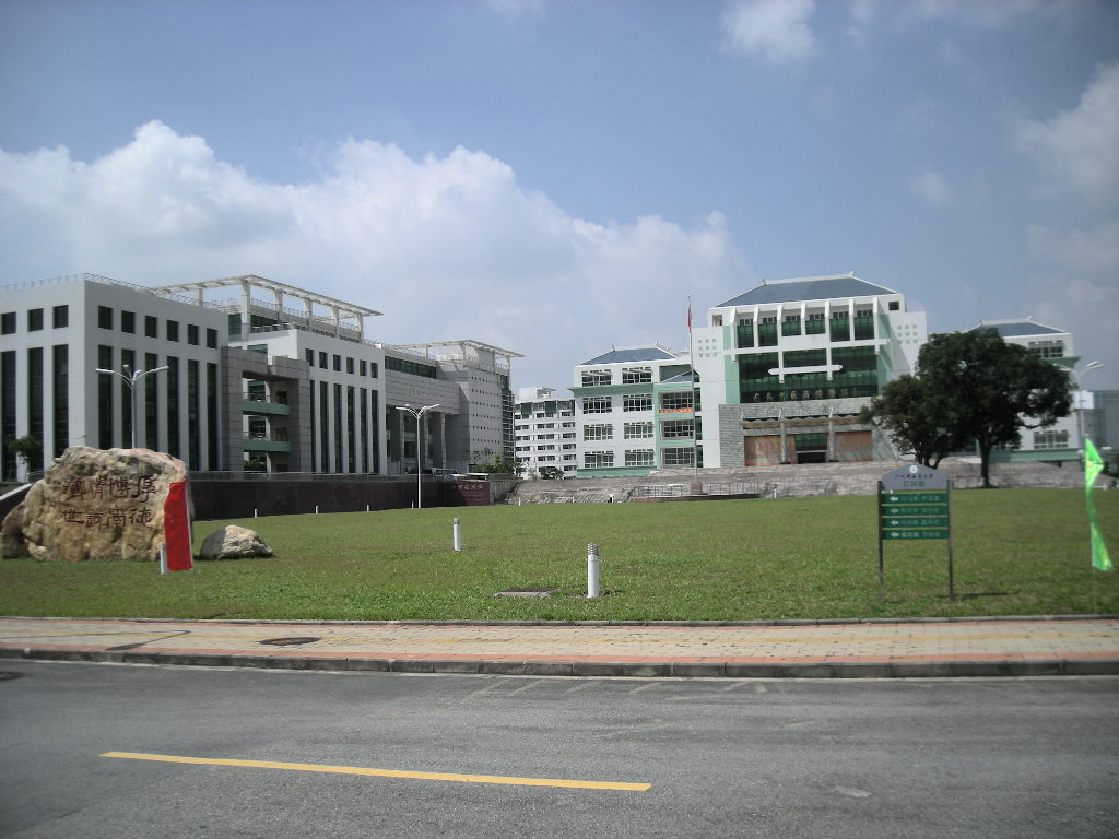 广州中医药大学大学城校区